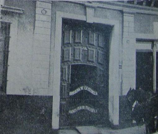 Casa donde nació Juan Manuel de Rosas, gobernador de Buenos Aires en dos oportunidades (1829/1832 y 1835/1852), que se ubicaba en la calle Defensa 437 de Buenos Aires, Argentina.